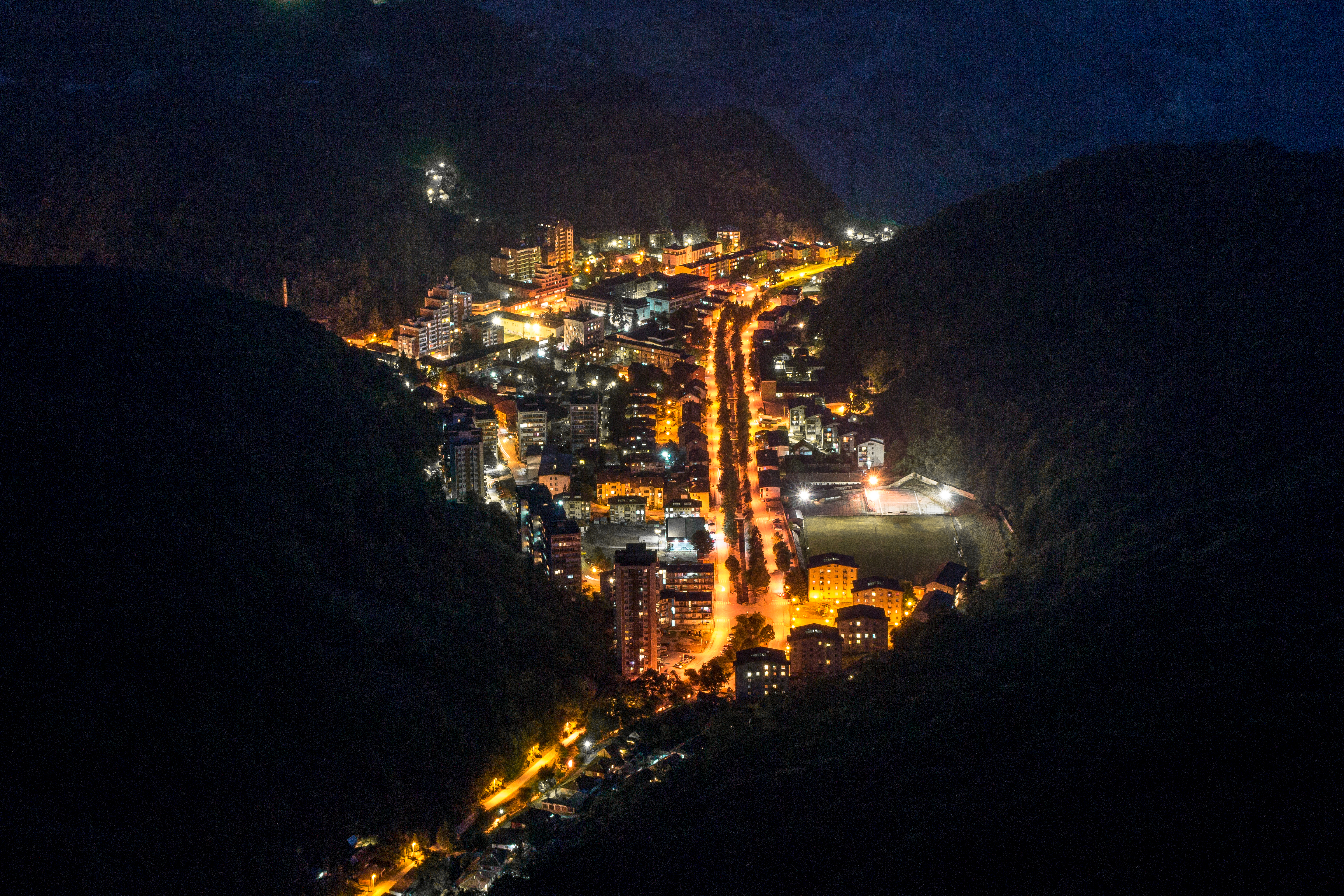 Majdanpek slikan sa vrha planine Starica noću